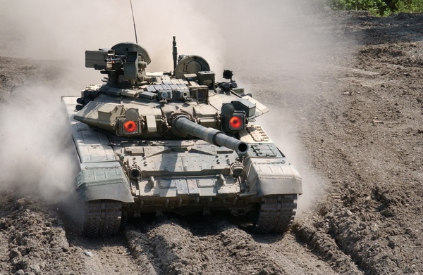 A Sthora-1 berendezés az ágyú mellet foglal helyet, így ezek alkotják a T-90 "szemeit".